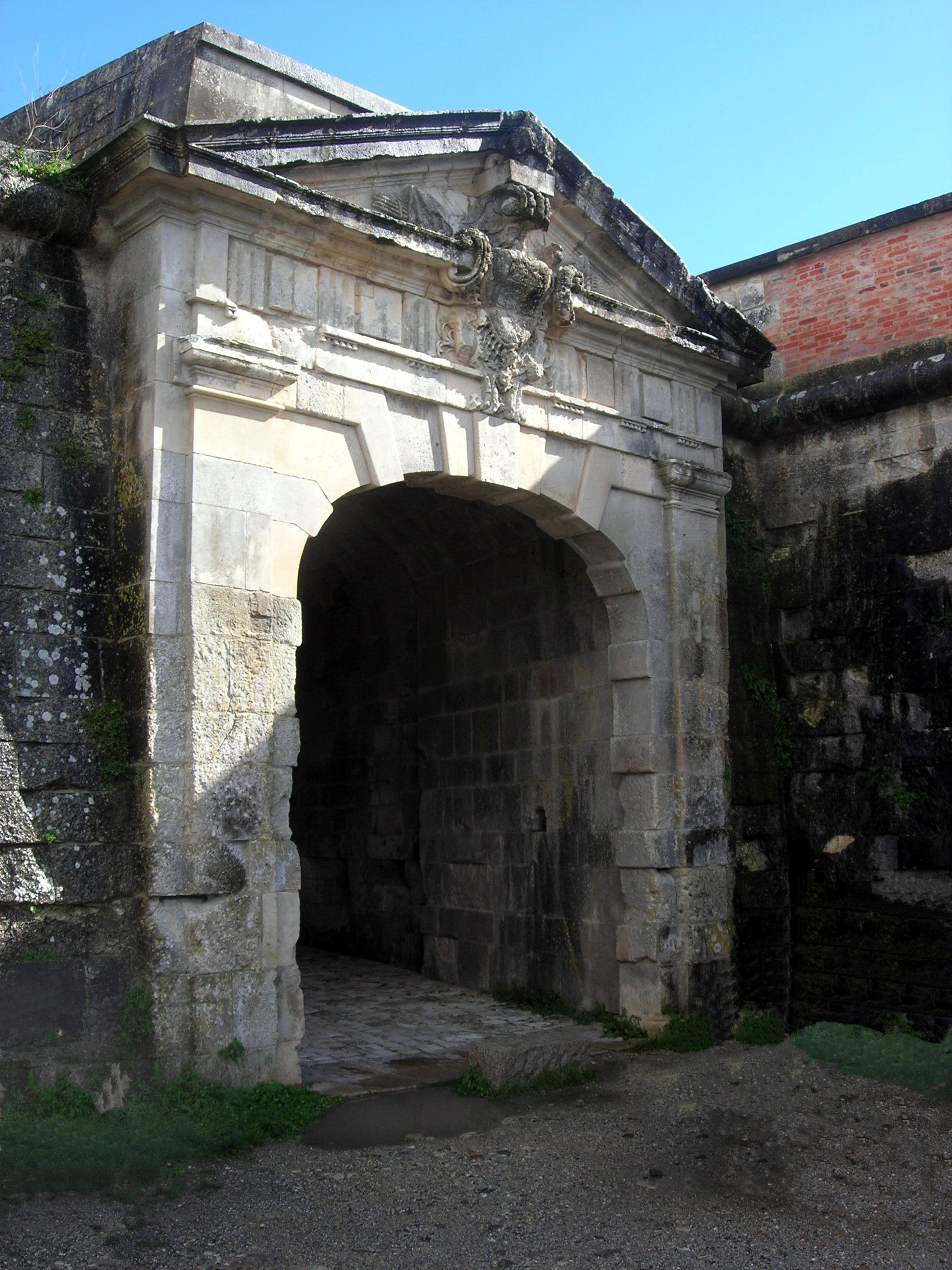 Description = La porte Royale à Brouage Source =Photo taken by Remi Jouan Date =Septembre 2006 Author =Remi Jouan